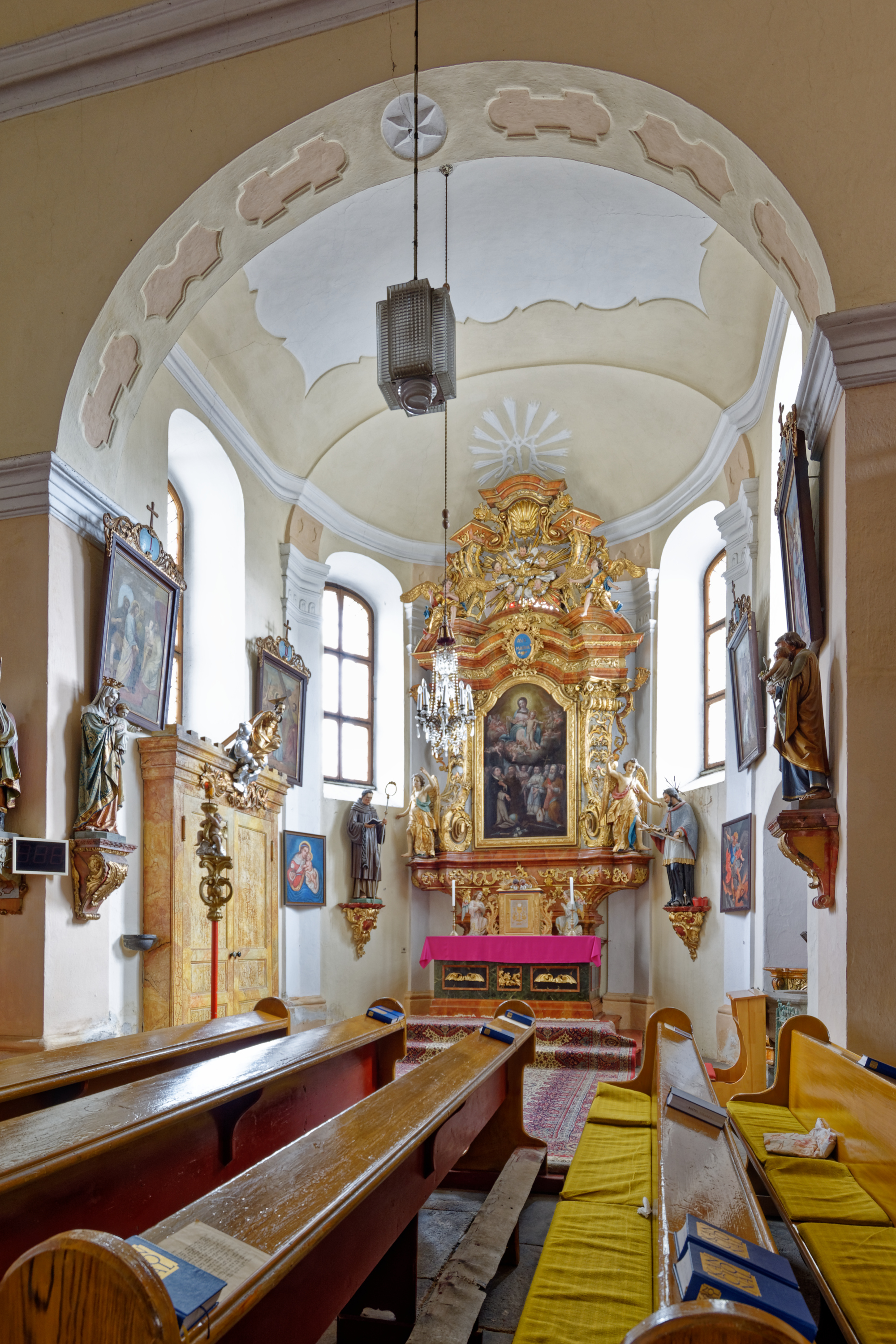 Kostel svaté Kateřiny Alexandrijské, Volary, Stožecká kaple (Tusset Kapelle).